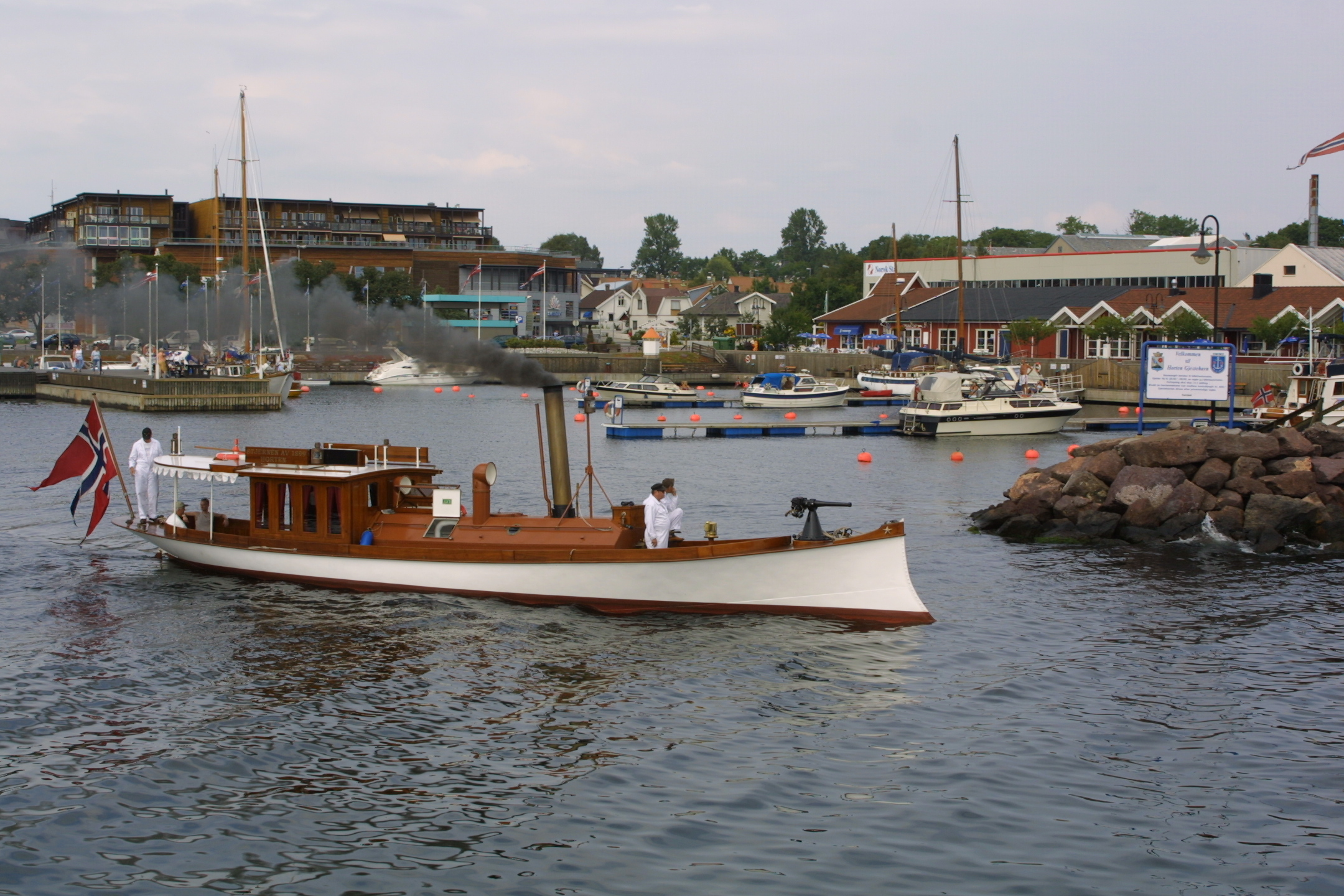 Kongesjaluppen "Stjernen" var i sin tid i Hans Majestets tjeneste, og fraktet storheter som Kong Oscar den 2., Kong Haakon og Kronprins Olav. Under krigen ribbet tyskerne den for alt av verdi, og den endte som lekter på Mjøsa før noen entusiaster fra Horten endelig forbarmet seg over det verneverdige skipet.